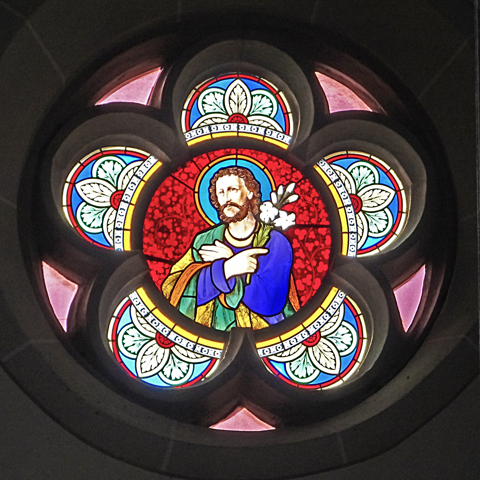 Buntglasfenster in der Pfarrkirche St. Maria Magdalena (Leinefelde)